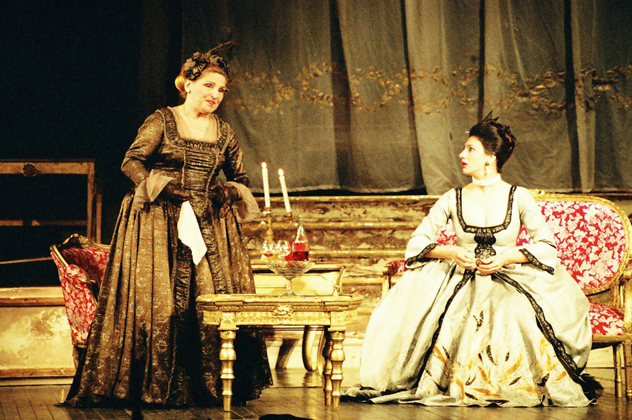 Mira Banjac u predstavi Opasne veze